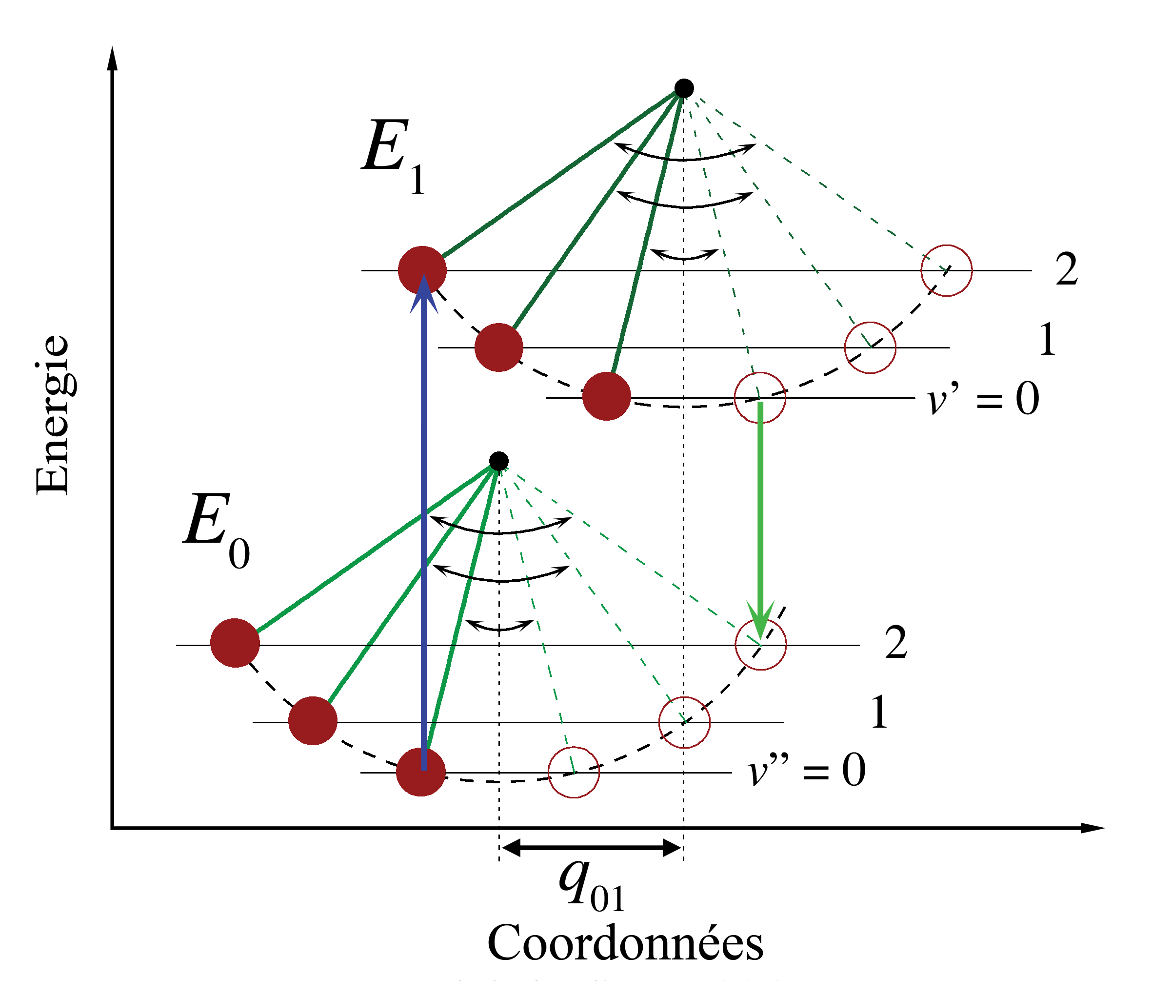 Franck Condon principle in a classical pendulum. Now in french. Le principe de Franck-Condon vu par l'exemple du pendule.